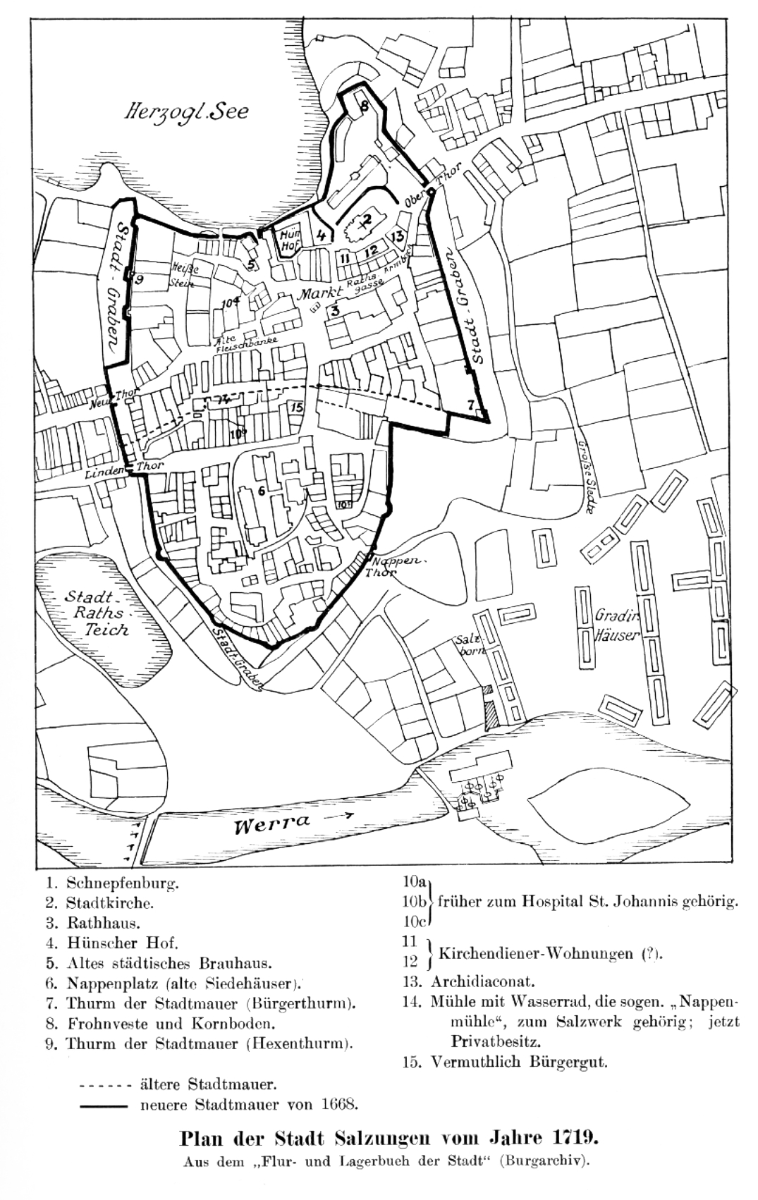 Plan der Stadt Salzungen um 1719 (Abzeichnung aus dem Lager- und Steuerbuch der Stadt)